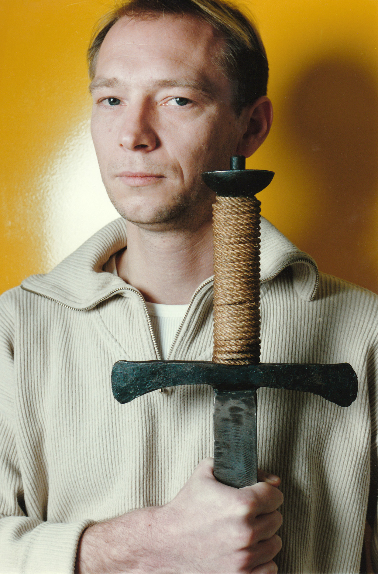 Luk Perceval, Vlaams toneelregisseur.